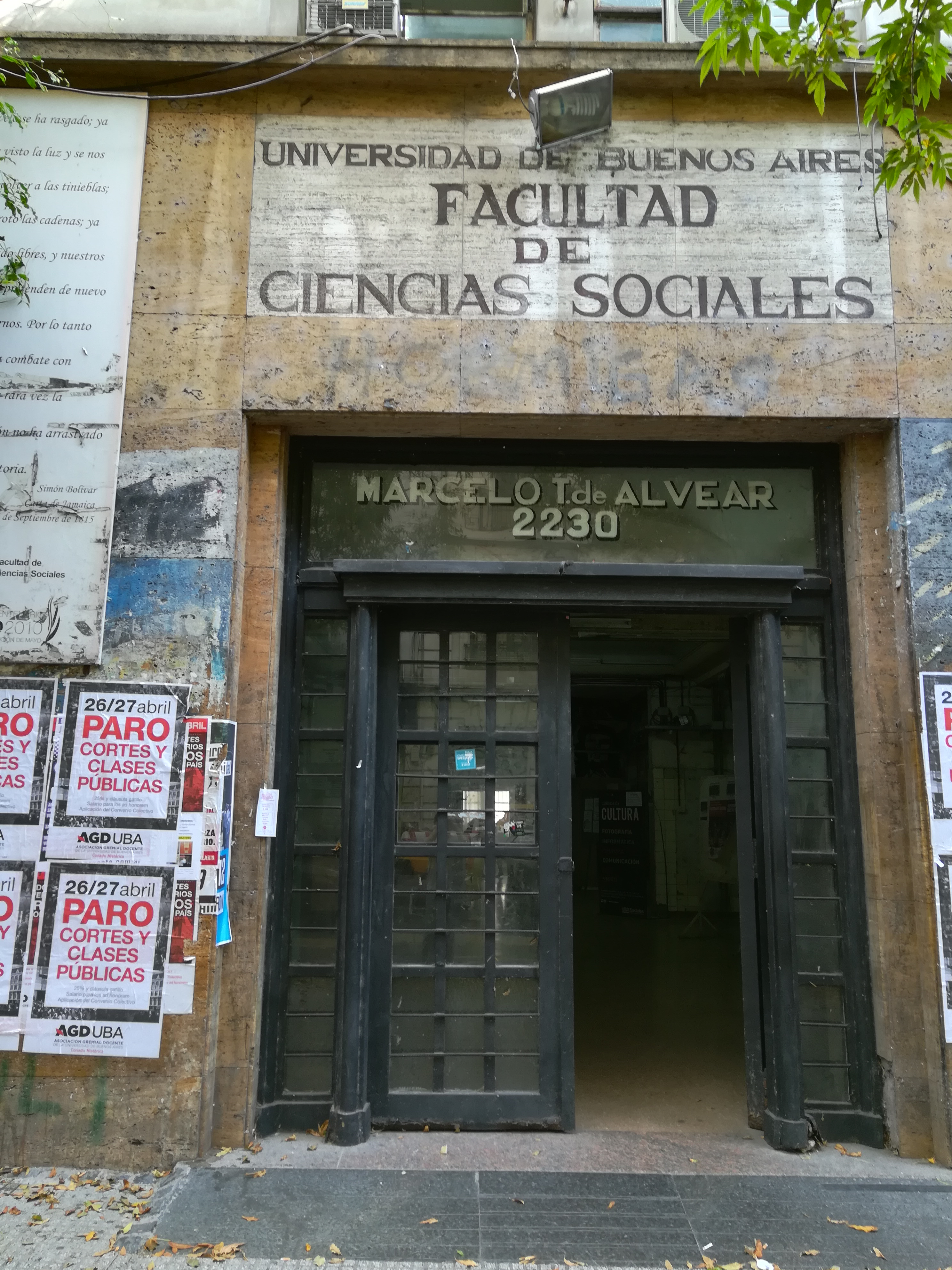 Uno de los Edificios Integrantes de la Facultad de Medicina, ubicado sobre la calle Marcelo T. de Alvear 2230, entre las calles Uriburu y Azcuenaga, Recoleta.